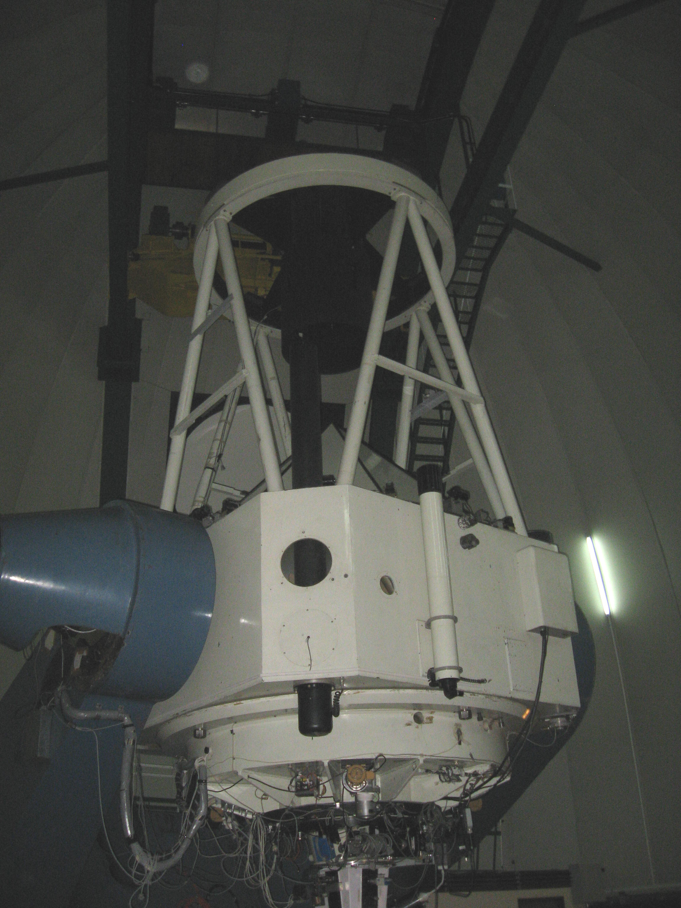 Vista de telescopio, desde el interior de la cúpula de observación, utilizado en el complejo astronómico EL Leoncito, ubicado en el Dpto. Calingasta, Pcia. de San Juan, Argentina.